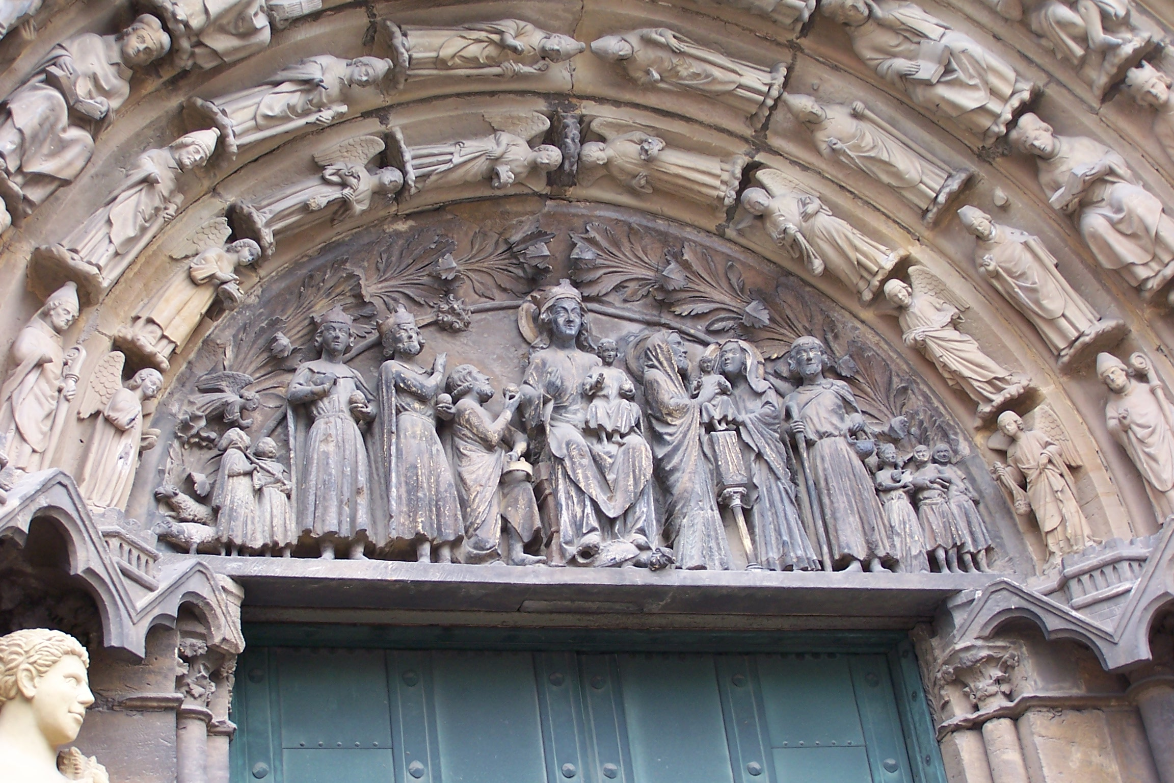 Mariendarstellung über dem Protal von Liebfrauen